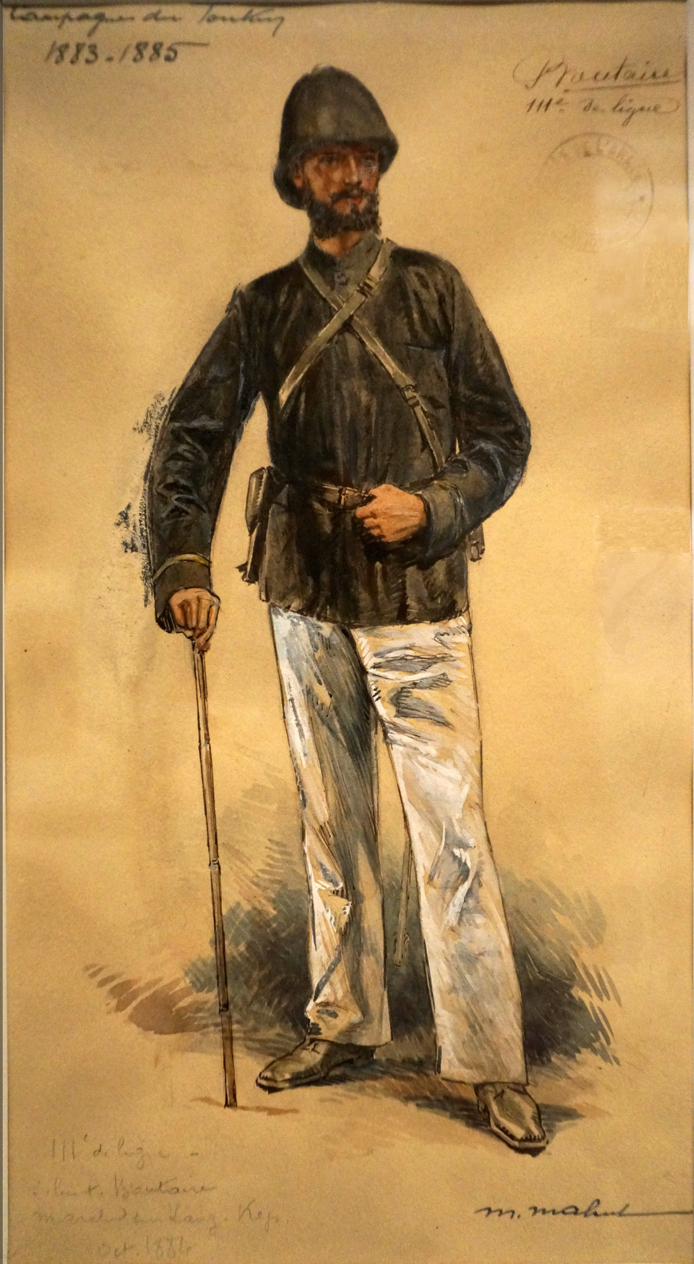 Présenté lors de l'exposition Indochine des territoires et des hommes 1856 1956 . Lieutenant Boutaire par Maurice Mahut (1878-1929)